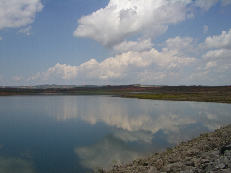 Nubes sobrel el pantano de Monteagudo de las Vicarías (Soria)